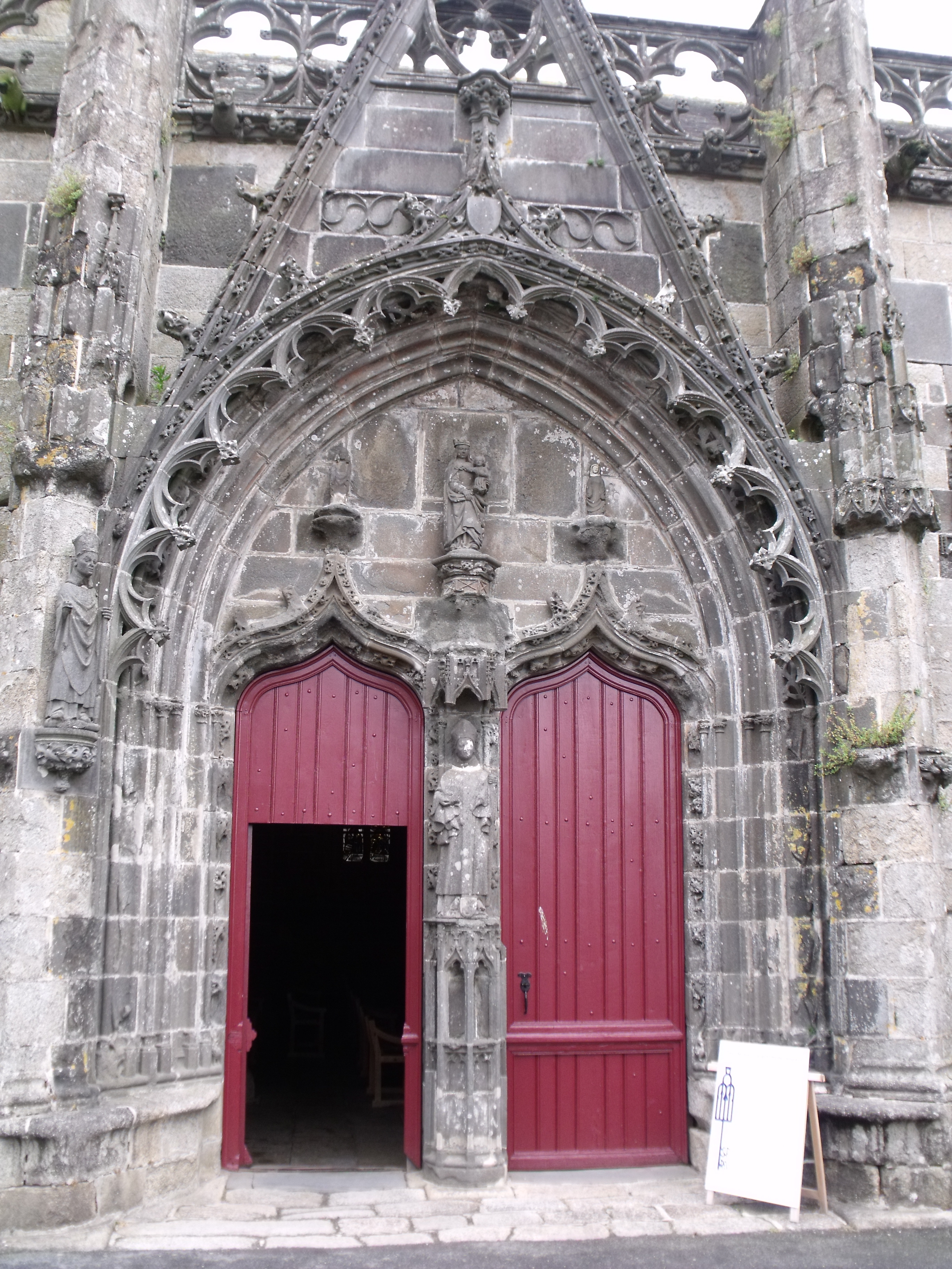 Portail sud de la basilique Notre-Dame du Folgoët (29).